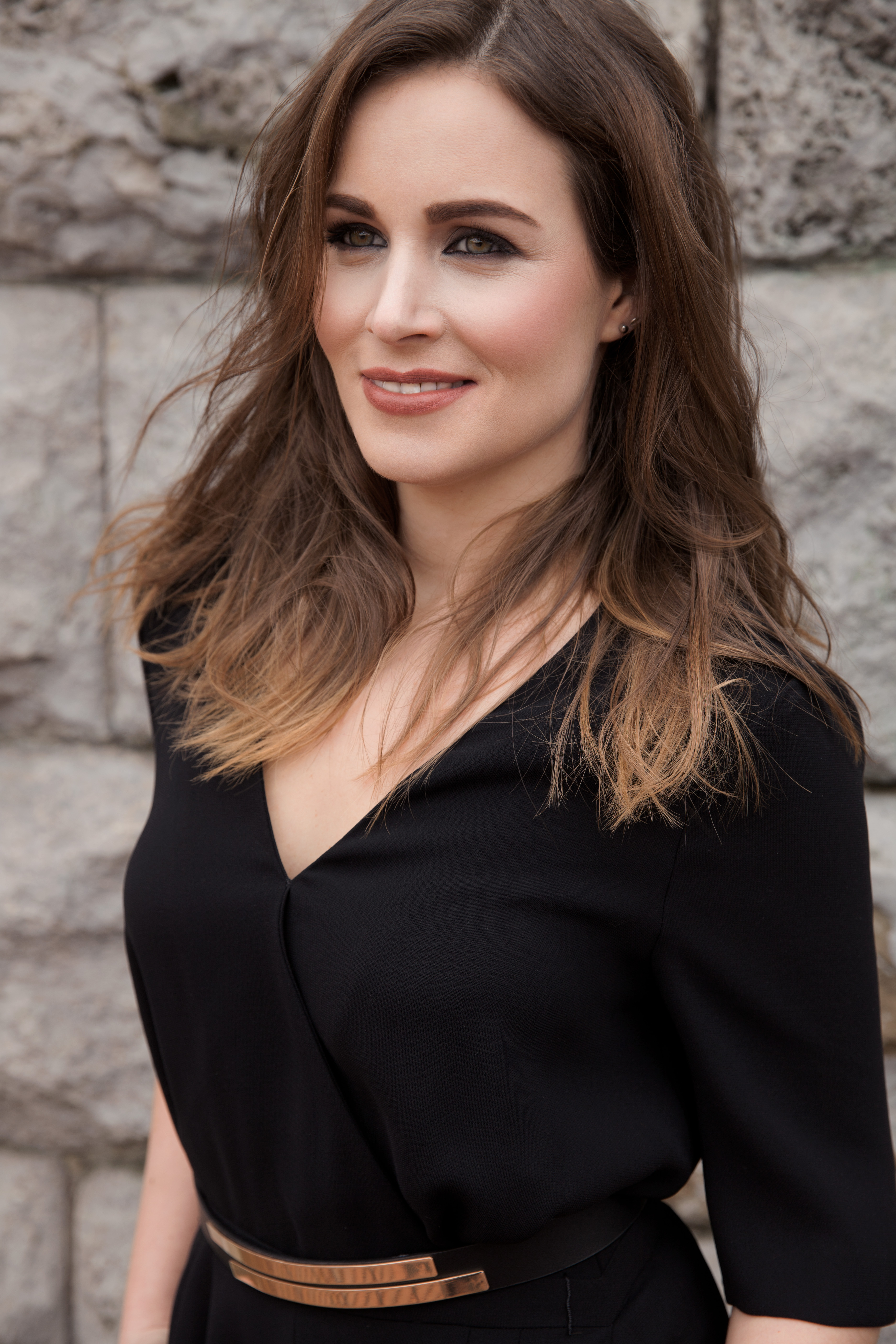 Natalie Hof